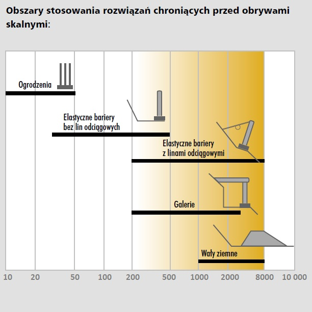 Obszary stosowania rozwiązań chroniacymi przed obrywami